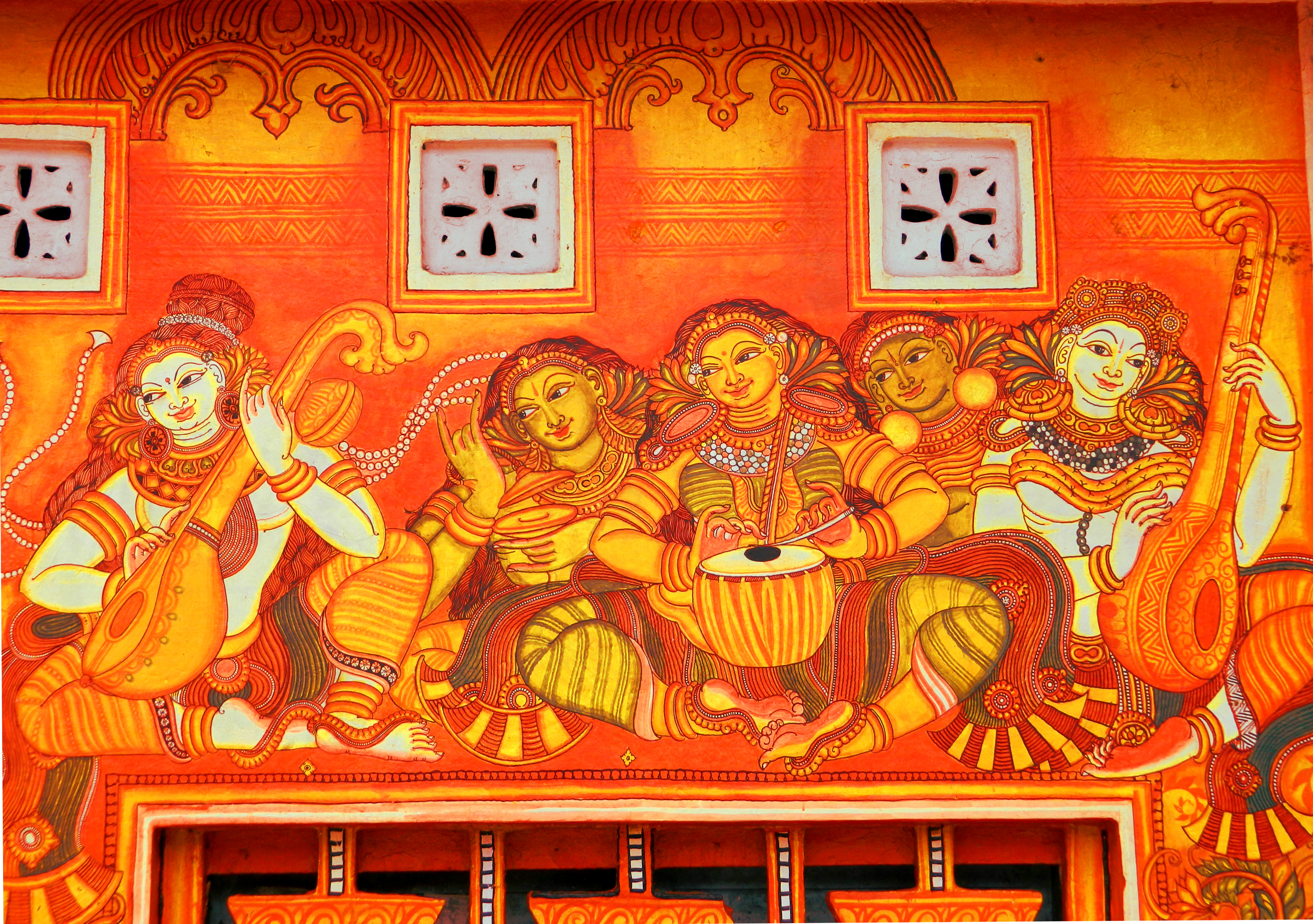 കോട്ടയം ചുമർച്ചിത്ര നഗരിയുടെ ഭാഗമായി വരച്ച ചുമർച്ചിത്രം - ഗാന്ധി പ്രതിമയ്ക്ക് സമീപം, തിരുനക്കര മൈതാനം.